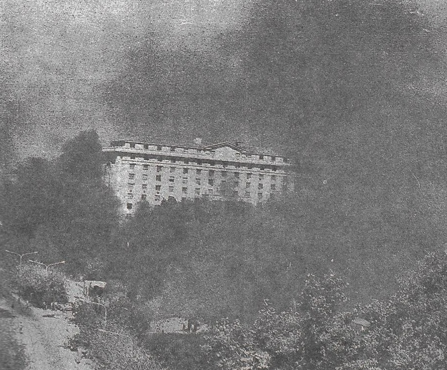 Casa de Gobierno de Mendoza durante el Mendozazo y la renuncia del gobernador Gabrielli.